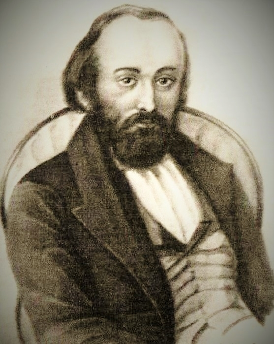 Michail Vasil'evič Petraševkij (1821-1866)